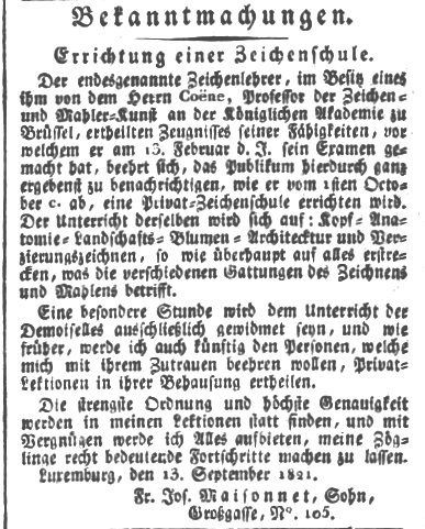 Annonce de François-Joseph Maisonnet sur l'ouverture de son école de dessin, parue au Luxemburger Wochenblatt le 15.09.1821